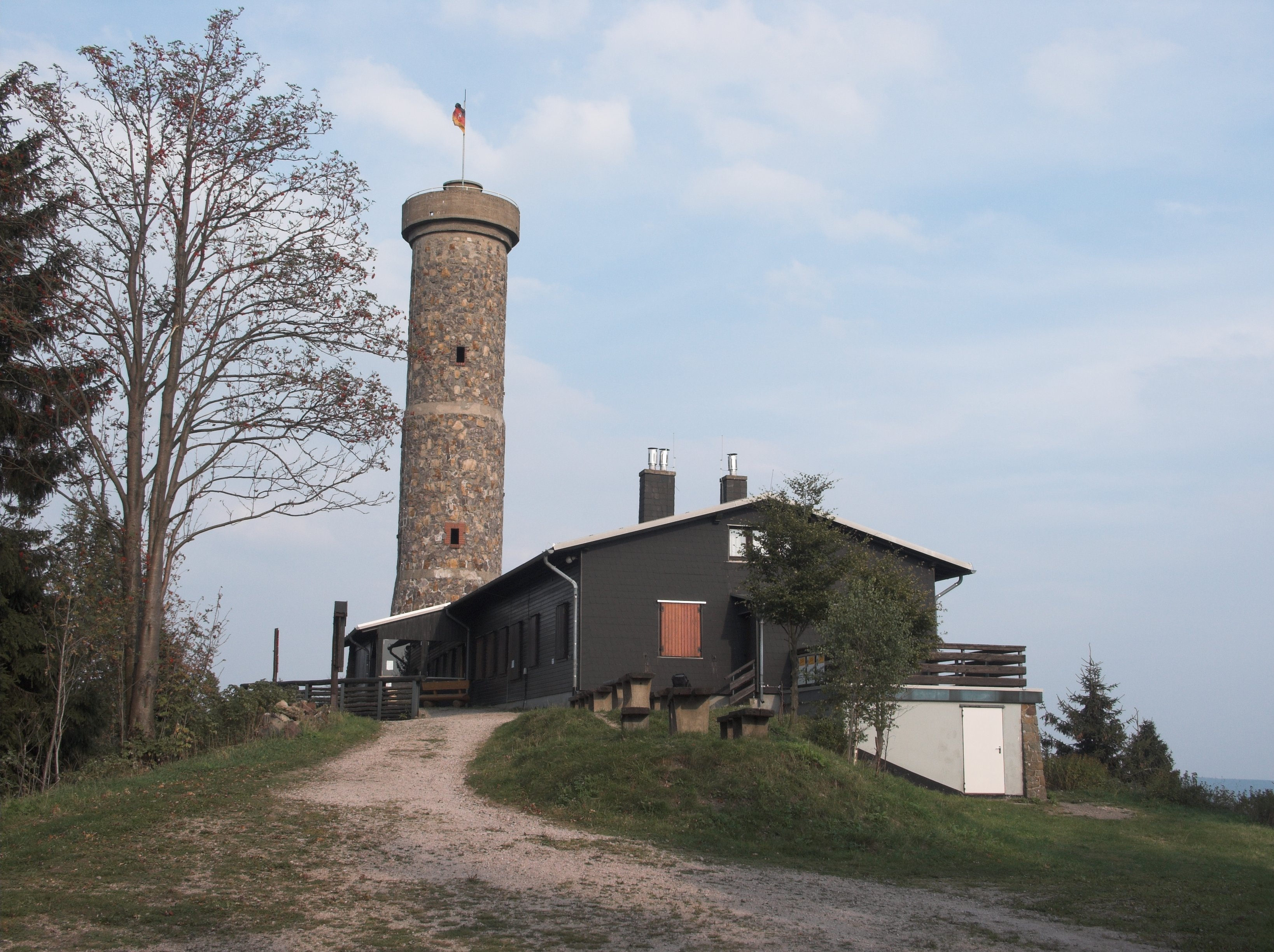 Gipfel des großen Knollens